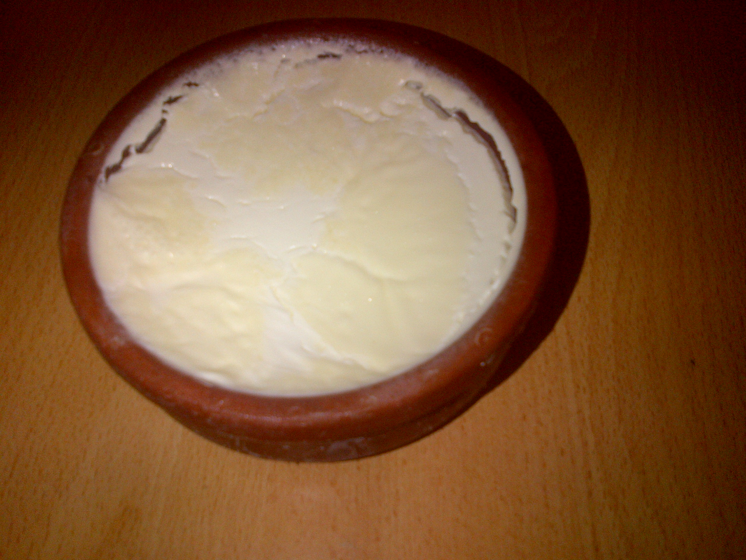 Un recipiente de barro con el famoso yogur de Silivri hecho con leche de bufala.